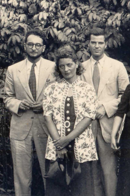 Claude Lévi-Strauss em visita ao Museu Nacional. Fotografia, acervo do Museu Nacional/UFRJ- Rio de Janeiro, Brasil. Identificados da esquerda para a direita: 1 Claude Levi-Strauss; 2 Ruth Landes, da Universidade de Columbia; 3 Charles Walter Wagley, da Universidade de Columbia; 4 Heloísa Alberto Torres, do Museu Nacional; 5 Luís de Castro Faria, do Museu Nacional; 6 Raimundo Lopes da Cunha, do Museu Nacional; 7 Edison Carneiro. Nota: No Relatório do Museu Nacional, referente ao período 1931-1940, consta que "Um grupo de antropólogos da Universidade de Columbia, discípulos do prof. F. Boas, fez estágio no Brasil durante cerca 'de dois anos, trabalhando em cooperação estreita com a Seção de Antropologia". Entre eles: Ruth Landes e Charles Wagley (MN.DR, classe 146.0, relatório 1931-1940).